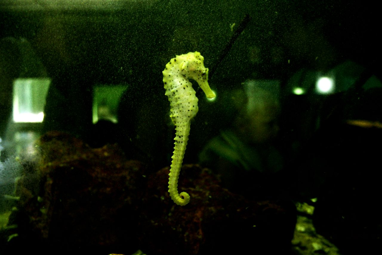 Cavalo Marinho no Aquário Natal em Natal no Rio Grande do Norte, Brasil.